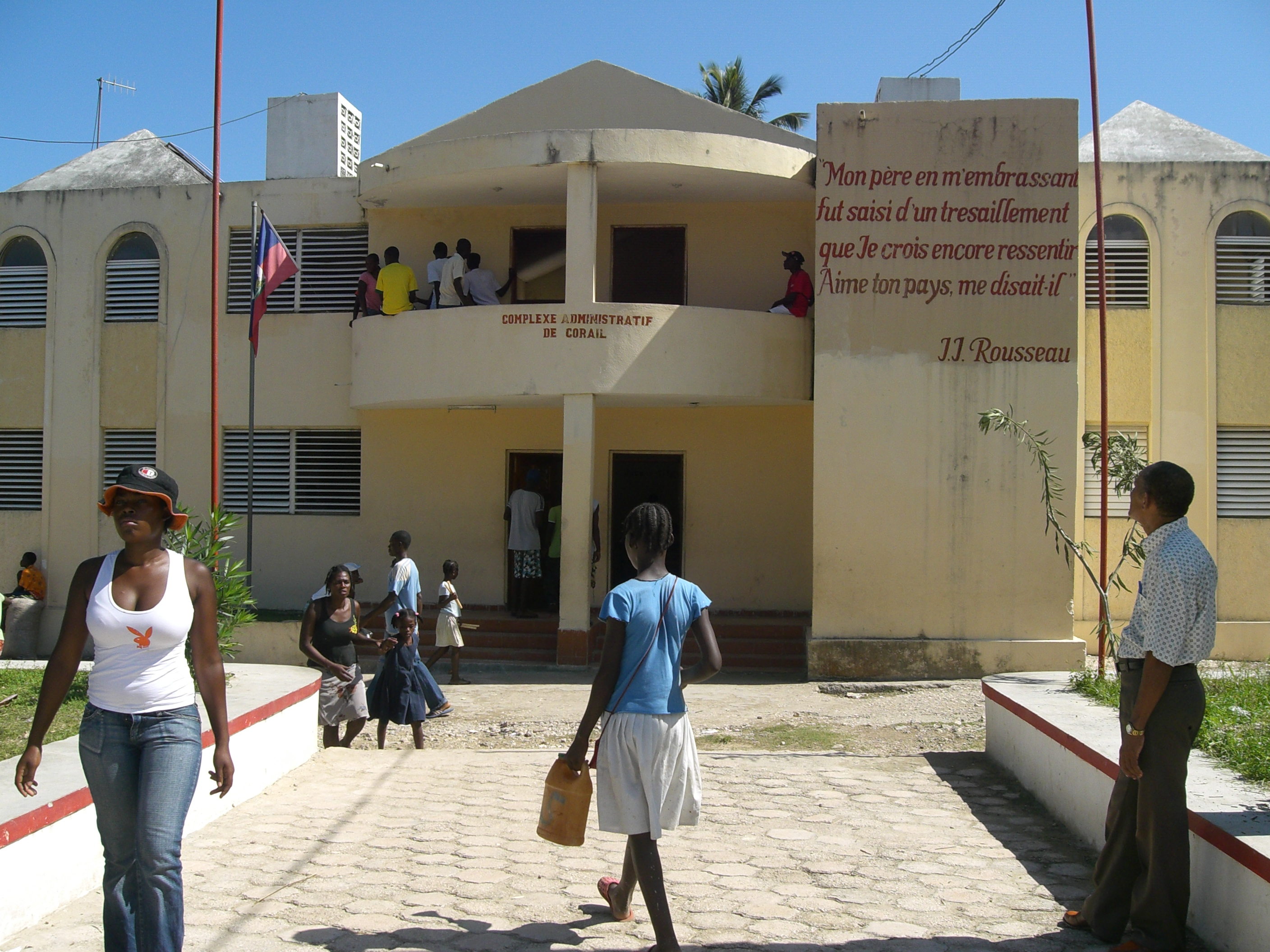 Corail, Haiti